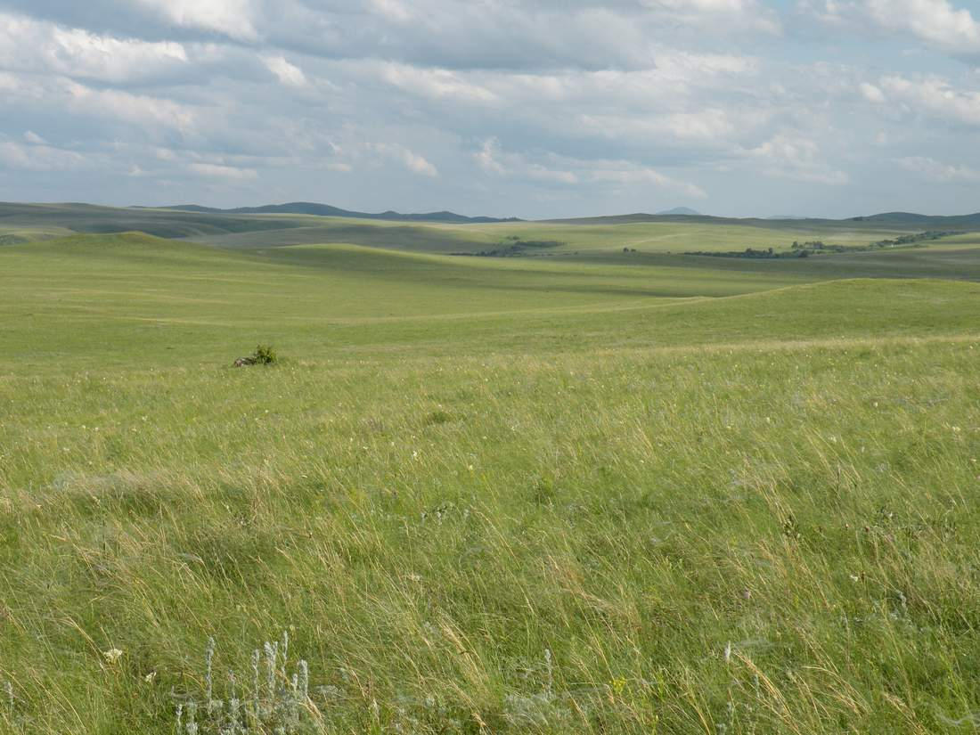 Настоящая разнотравно-дерновиннозлаково-красноковыльная степь в бассейне реки Кукуйки в Курьинском районе Алтайского края. Доминирующий ковыль Залесского (Stipa zalesskii) уже отцвел и облетел, массово цветет таволожник (Filipendula vulgaris)